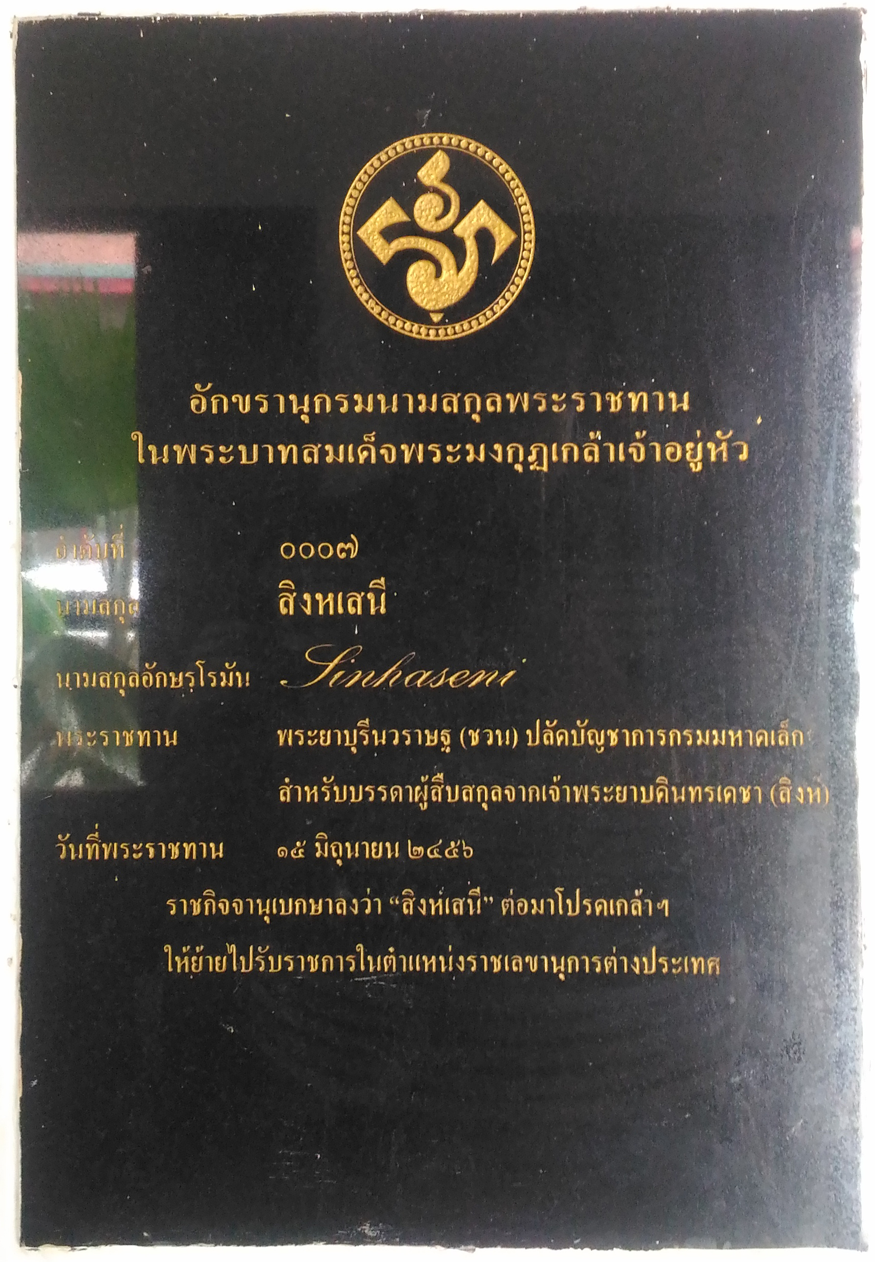 ศาลเจ้าพระยาบดินทรเดชา (สิงห์ สิงหเสนี) สมุหนายกและแม่ทัพใหญ่ในพระบาทสมเด้จพระนั่งเกล้าเจ้าอยู่หัวรัชกาลที่ 3 ตั้งอยู่ในวัดจักรวรรดิราชาวาส แขวงจักรวรรดิ เขตสัมพันธวงศ์ กรุงเทพมหานคร